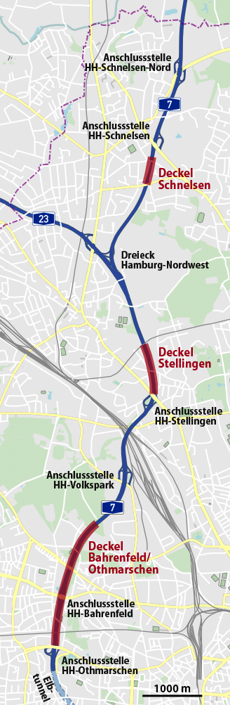 Karte des Hamburger Deckels This map may be incomplete, and may contain errors. Don't rely solely on it for navigation.